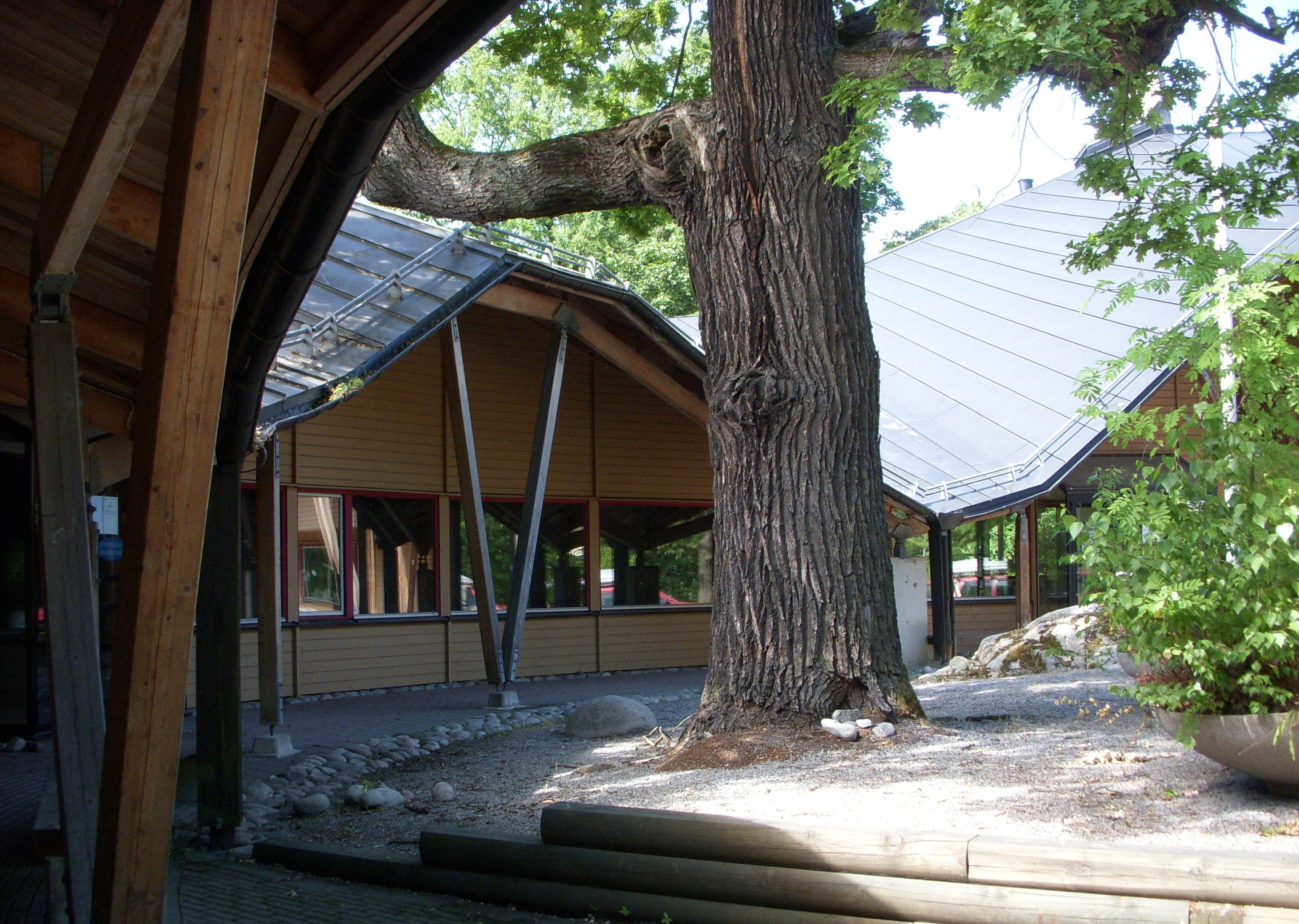 Juristerna hus, Stockholms universitet